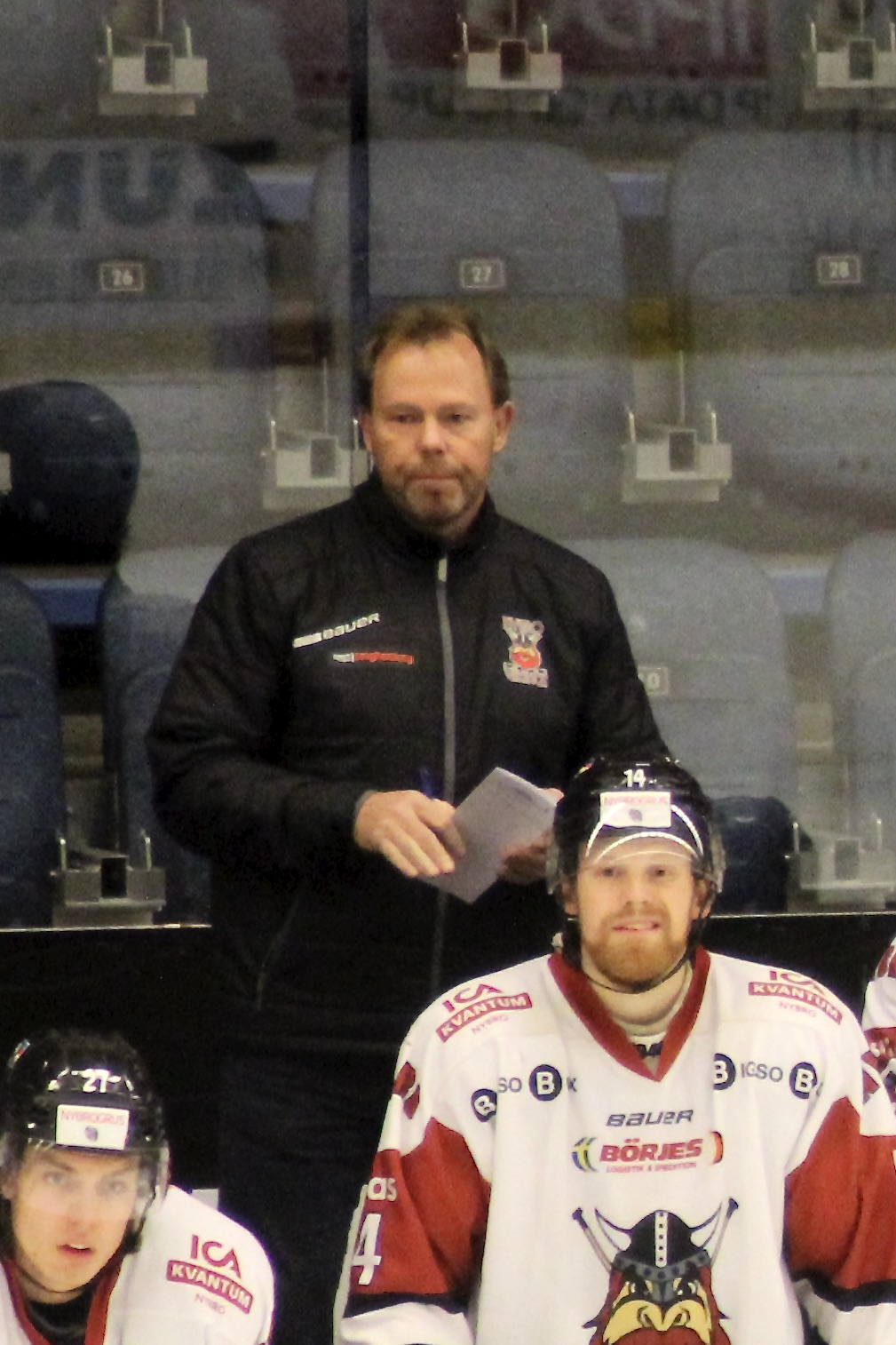 Mikael Tisell i tränarbåset för Nybro Vikings under en match i Borås Arena mot Borås HC. 2019-11-06. Framför honom står Otto Henell och Robin Wengdahl.